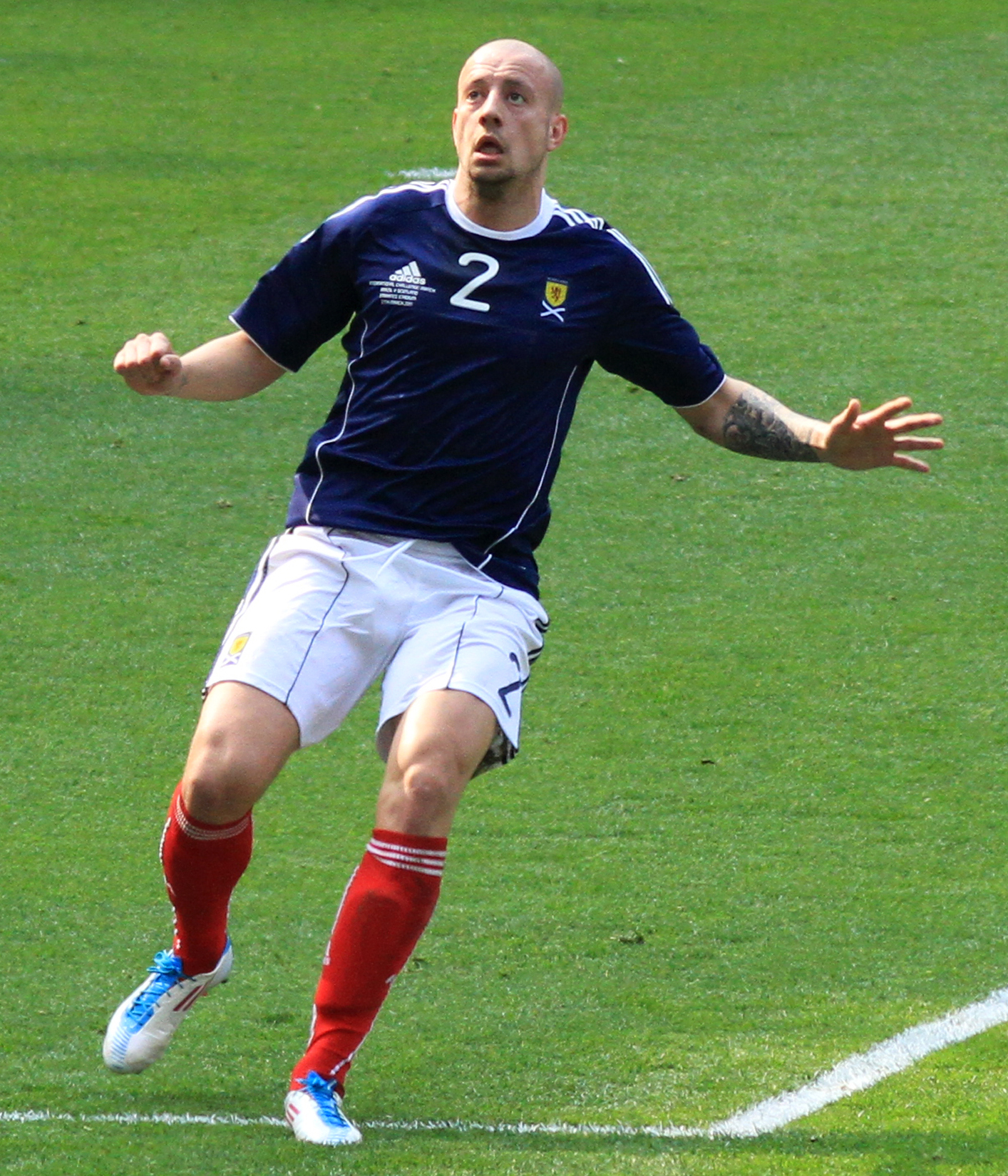 Alan Hutton defending 1